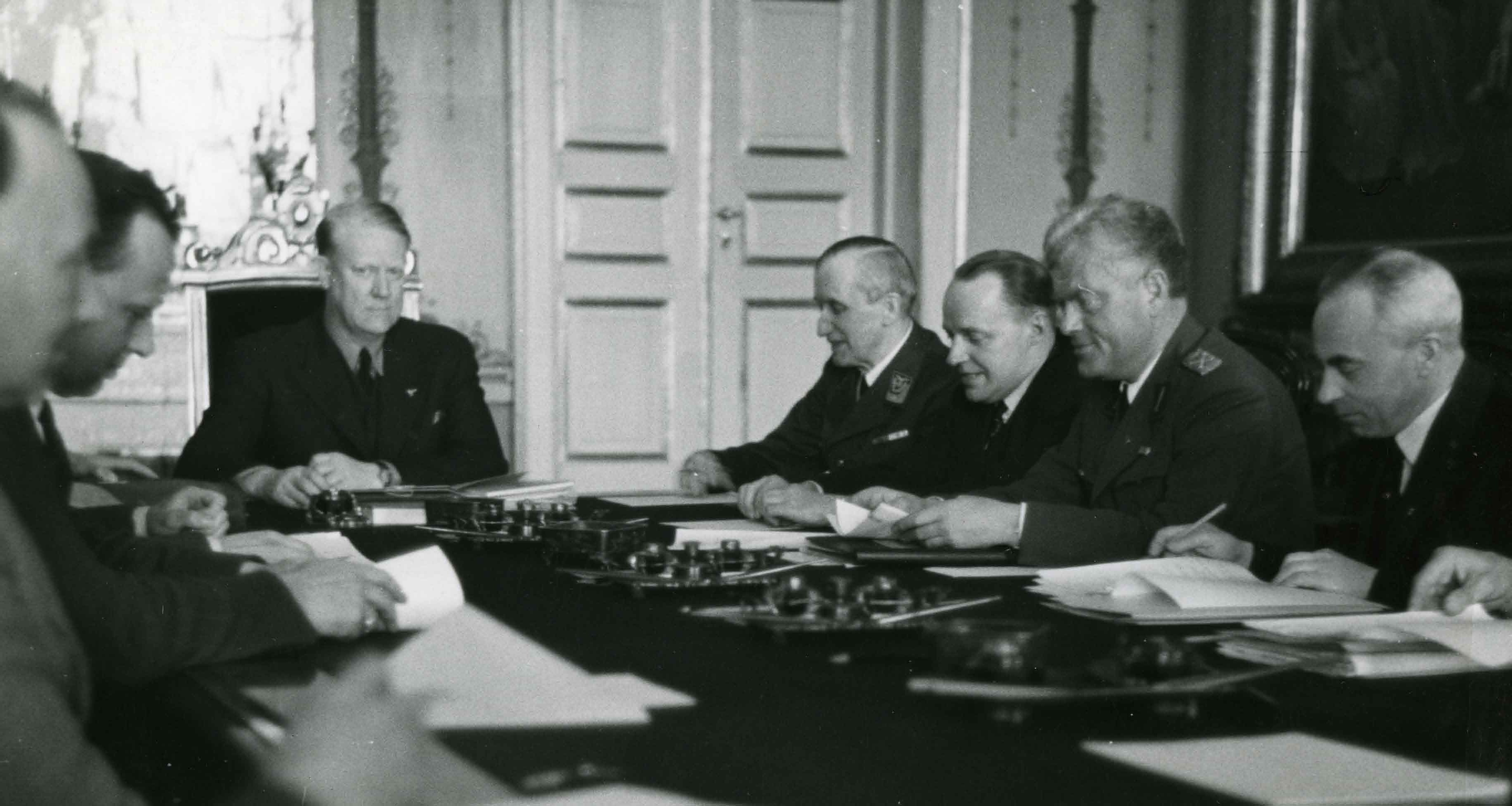 Ukjent datering RA/PA-0750/H/0002/ 1016